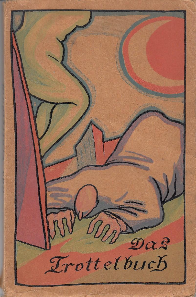 Franz Jung: Das Trottelbuch, Verlag:Theodor Gerstenberg (vormals Richard Sattlers Verlag), Leipzig, 1912. Umschlagzeichnung von Franz Seraph Henseler. Franz Jungs erstes Buch. 1918 übernahm Franz Pfemfert die Restauflage für seinen Verlag Die Aktion und hing ein neues Titelblatt ein